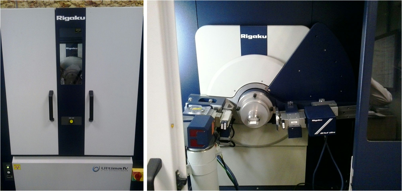 difratômetro